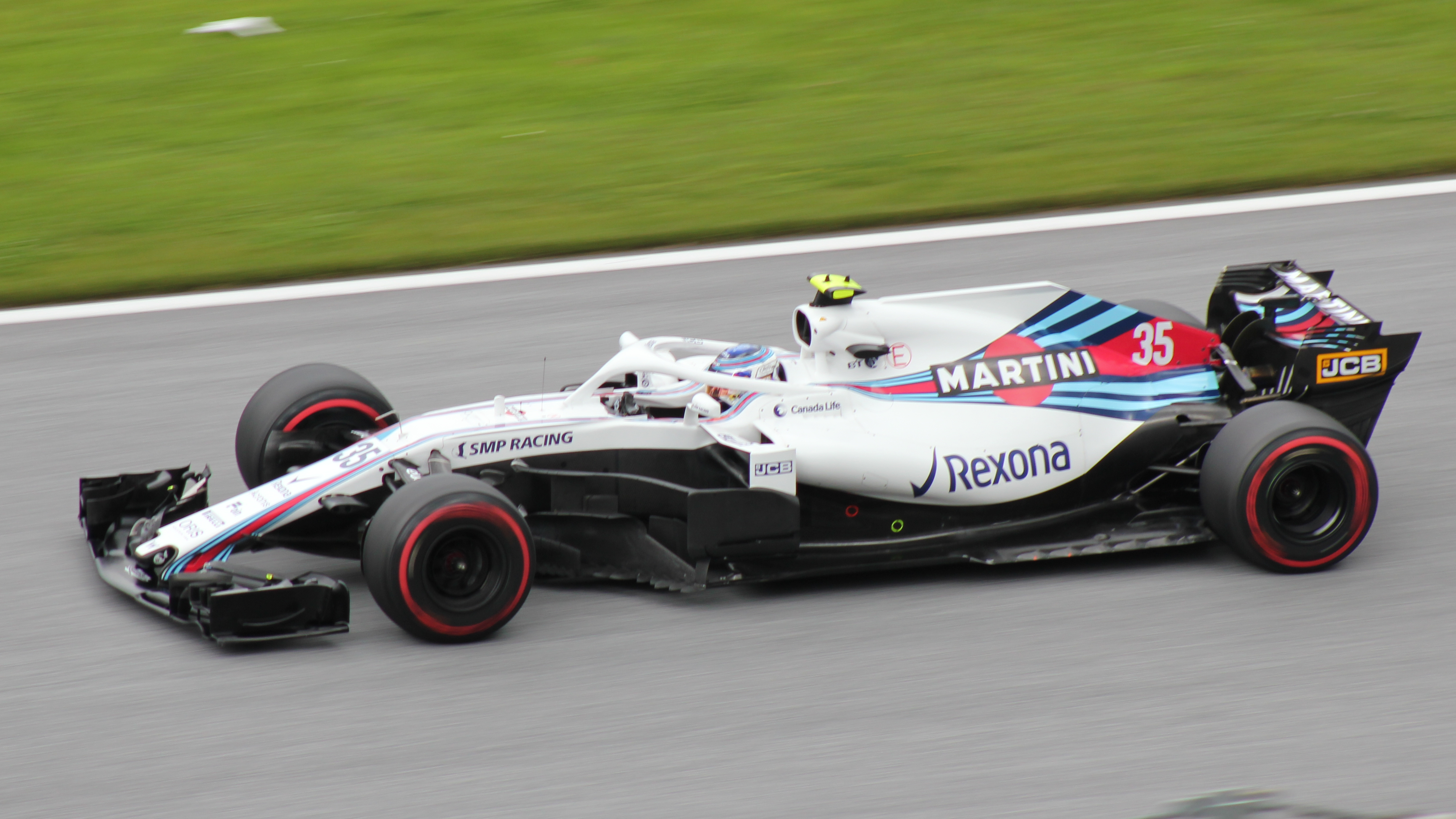 35 Sirotkin beim Rennwochenende in Österreich 2018